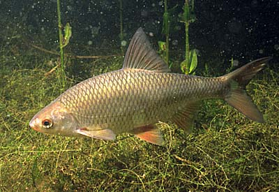 Met toestemming fotograaf: Ron Offermans